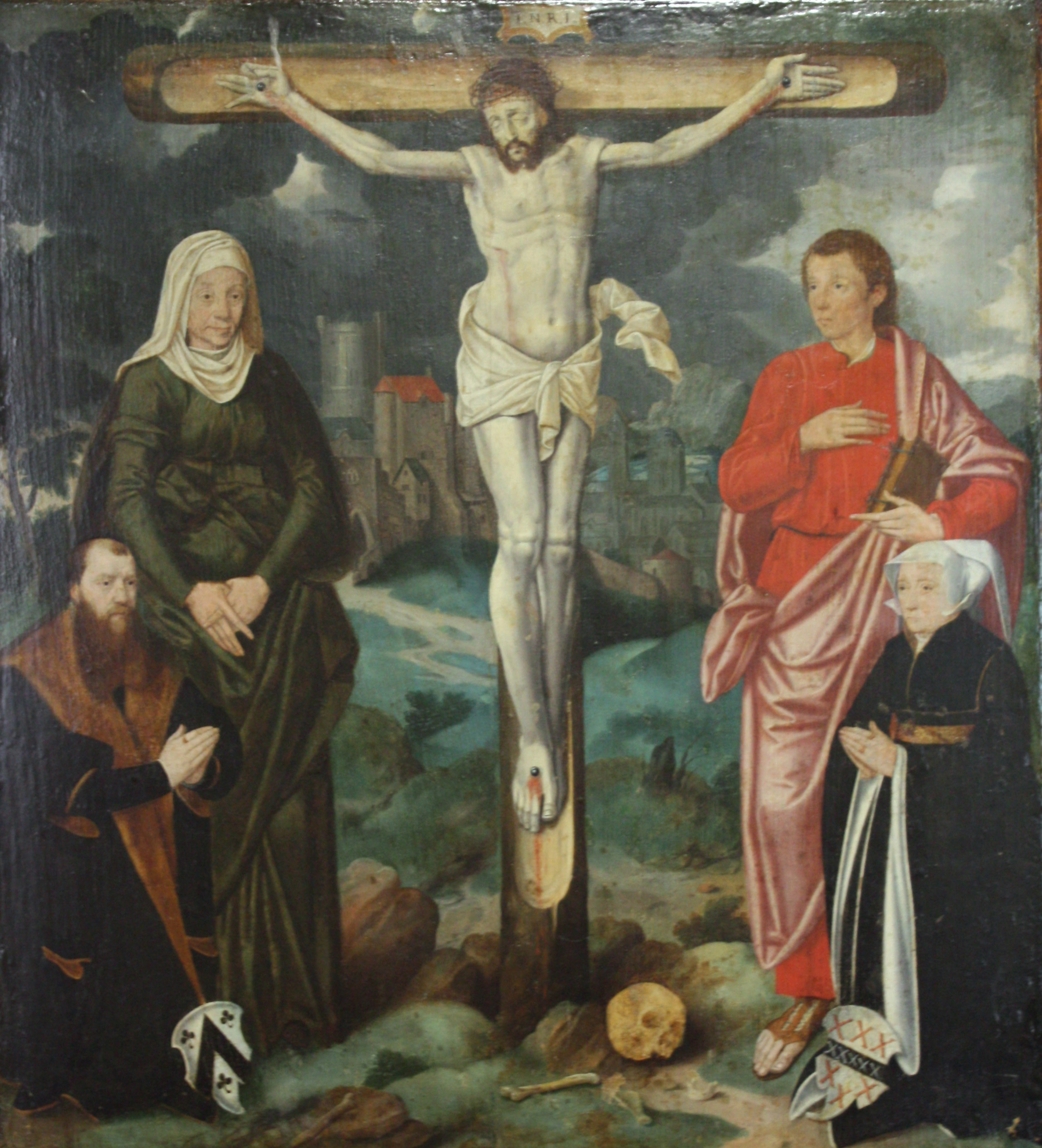 Mittelteil eines von Barthel Bruyn um 1556/57 geschaffenen Triptychons aus der 1803 geschlossenen Kirche St. Jakob. Darstellung der Kreuzigung, Maria und Johannes sowie die der Stifterfiguren Hermann von Weinsberg und seiner Frau „Weisgin Ripgin“ (1511 - 1557) . Die Seitenteile des Flügelbildes gingen schon vor 1579 verloren